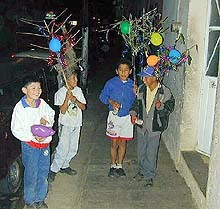 Niño cantando en procesión con la rama tabajqueña por sierto obradorista MORENA